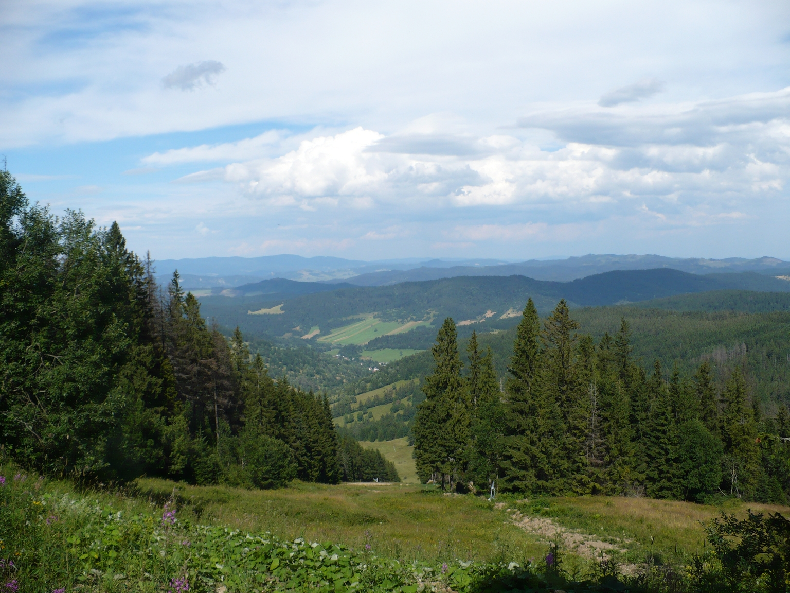 Jezersko je obec na Slovensku v okrese Kežmarok. Nad obcou sa nachádza Jezerské jazero (919 m.n.m.), je to prírodná rezervácia s rozlohou 2,18 ha.